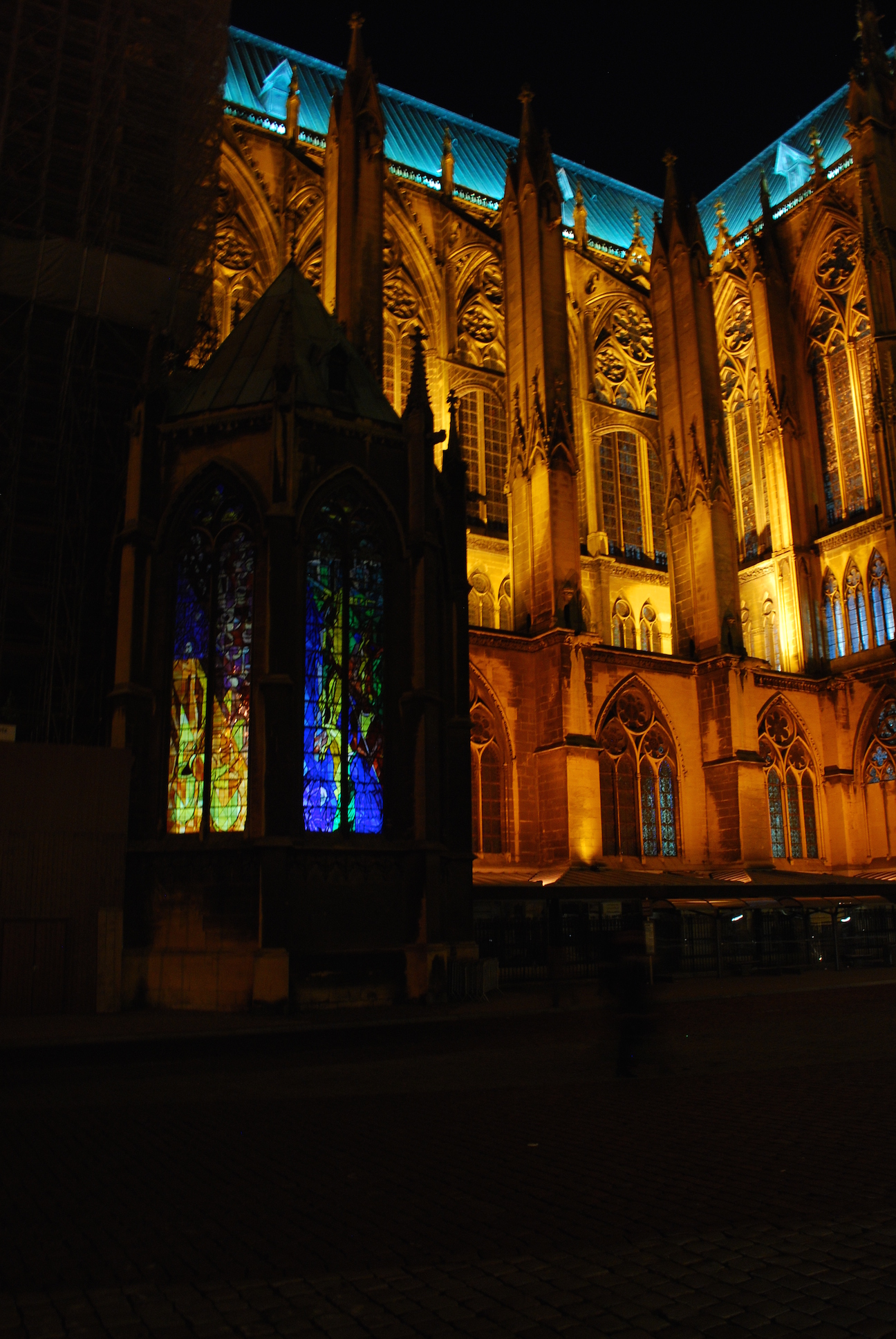 chapelle du Saint Sacrement avec les vitraux de Jacques Villon (vue extérieure)